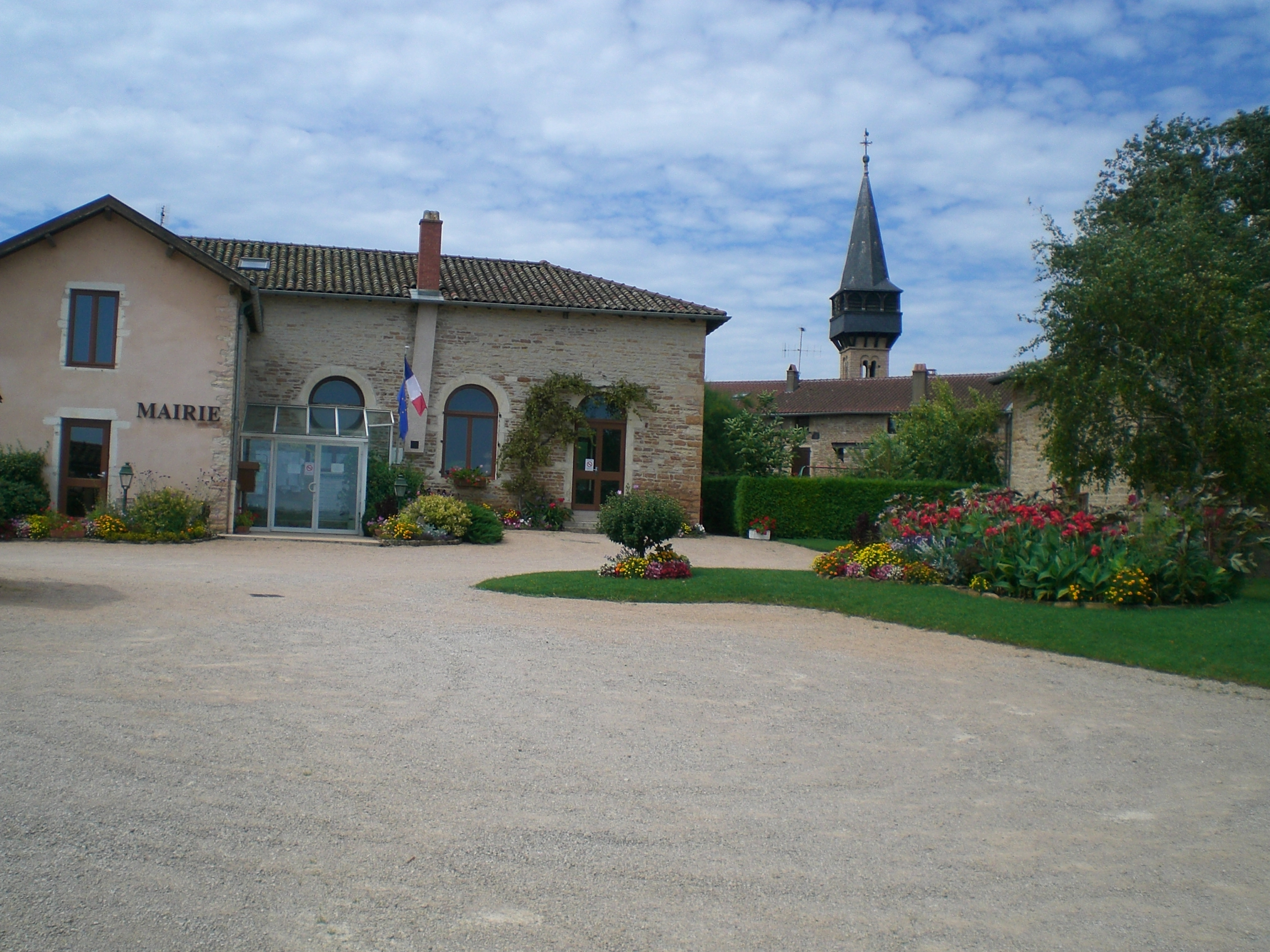 Description Clocher de l'église vu de la cour de la mairie Date2006SourceSelf-photographedAuthorRomuald Vieux Clocher de l'église vu de la cour de la mairie